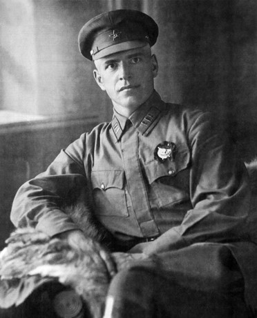 Георгий Константинович Жуков. Командир полка. 1920-е годы